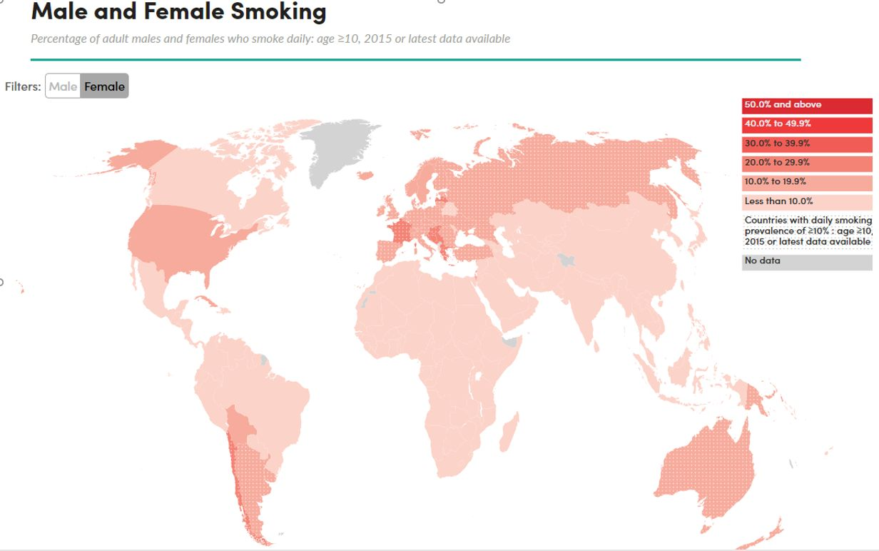 世界の10歳以上の女性喫煙率（2015年）